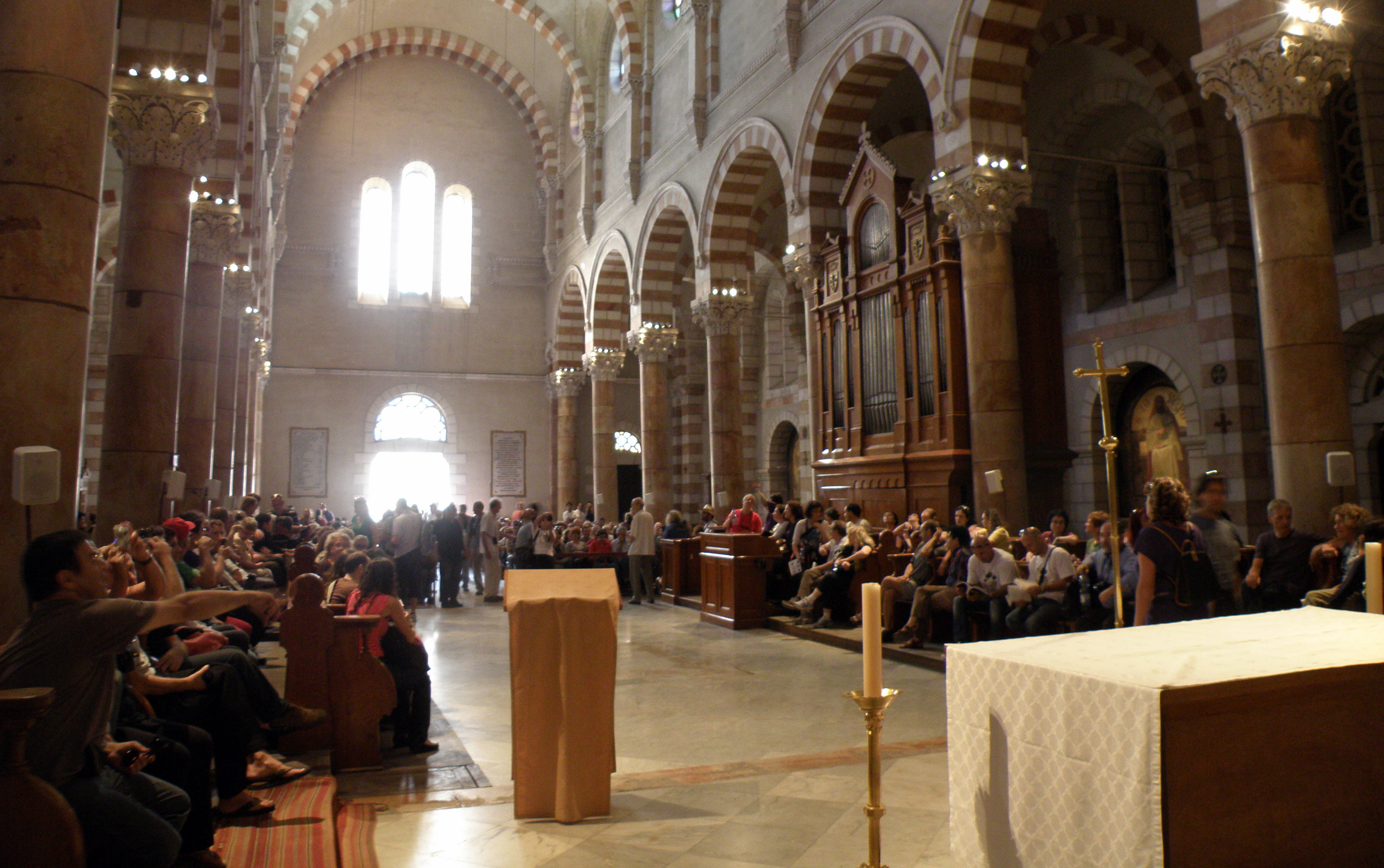 ה"אקול ביבליק" (בית הספר הצרפתי למקרא ולארכאולוגיה) והמנזר הדומיניקני (מנזר סנט אטיין), ירושלים Jerusalem